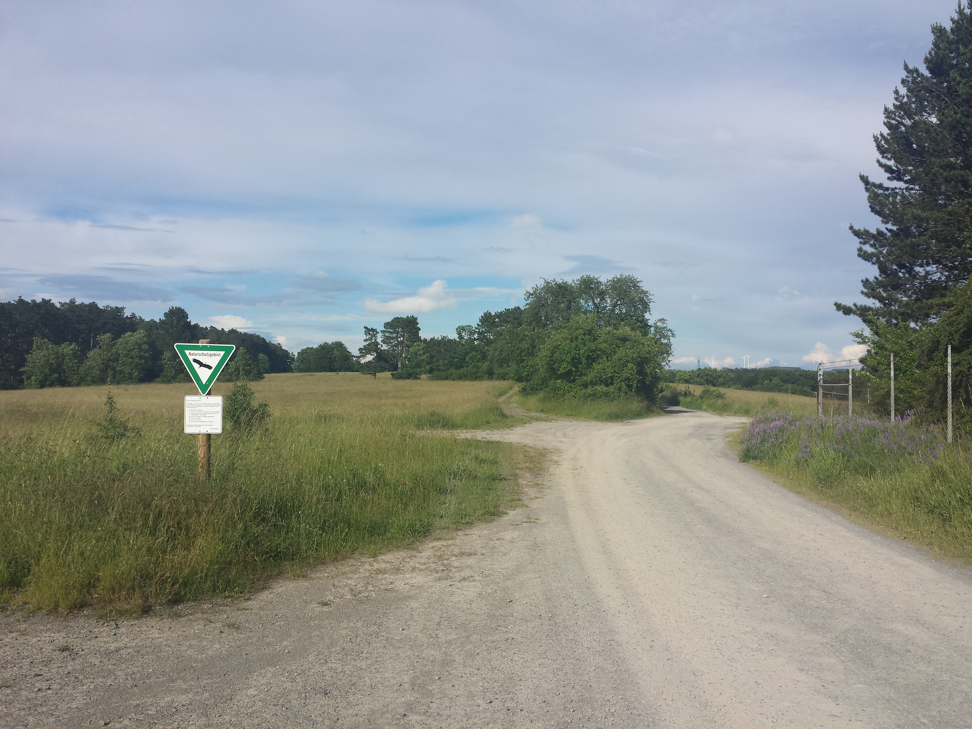 Der Jakobsweg Main-Taubertal im Bereich des Naturschutzgebietes Brachenleite bei Tauberbischofsheim.